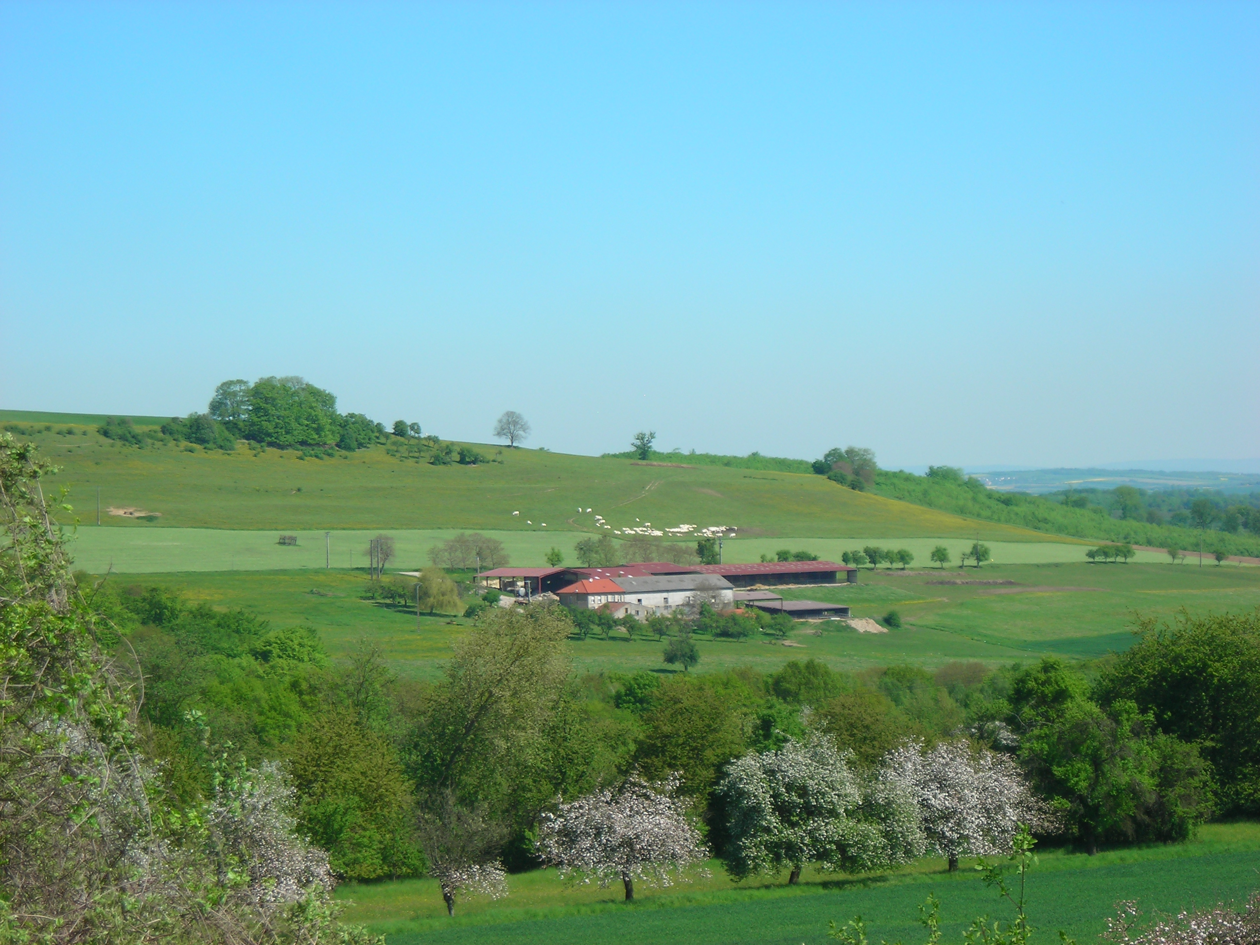 Guerting